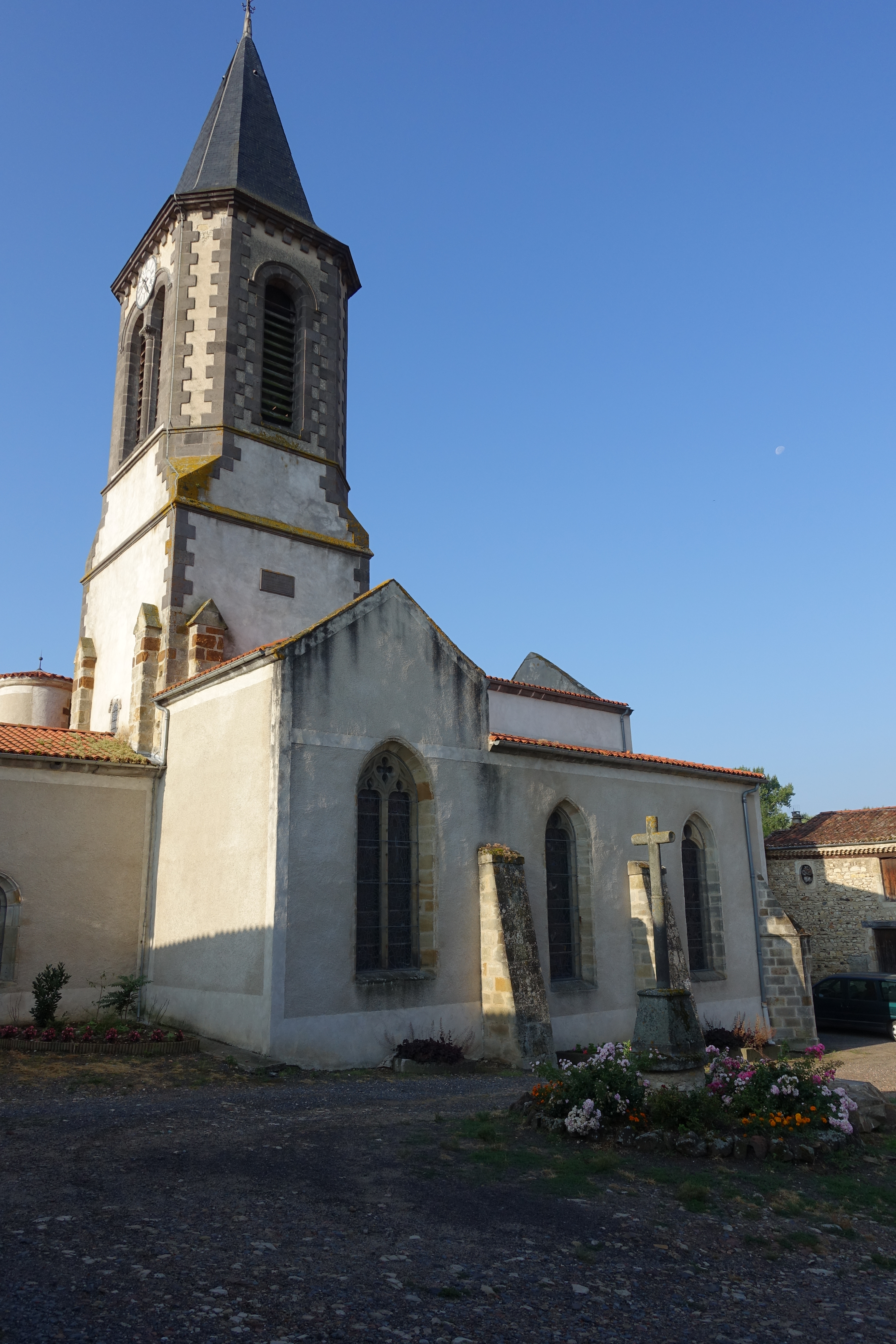 Église Saint-Julien d'Espirat